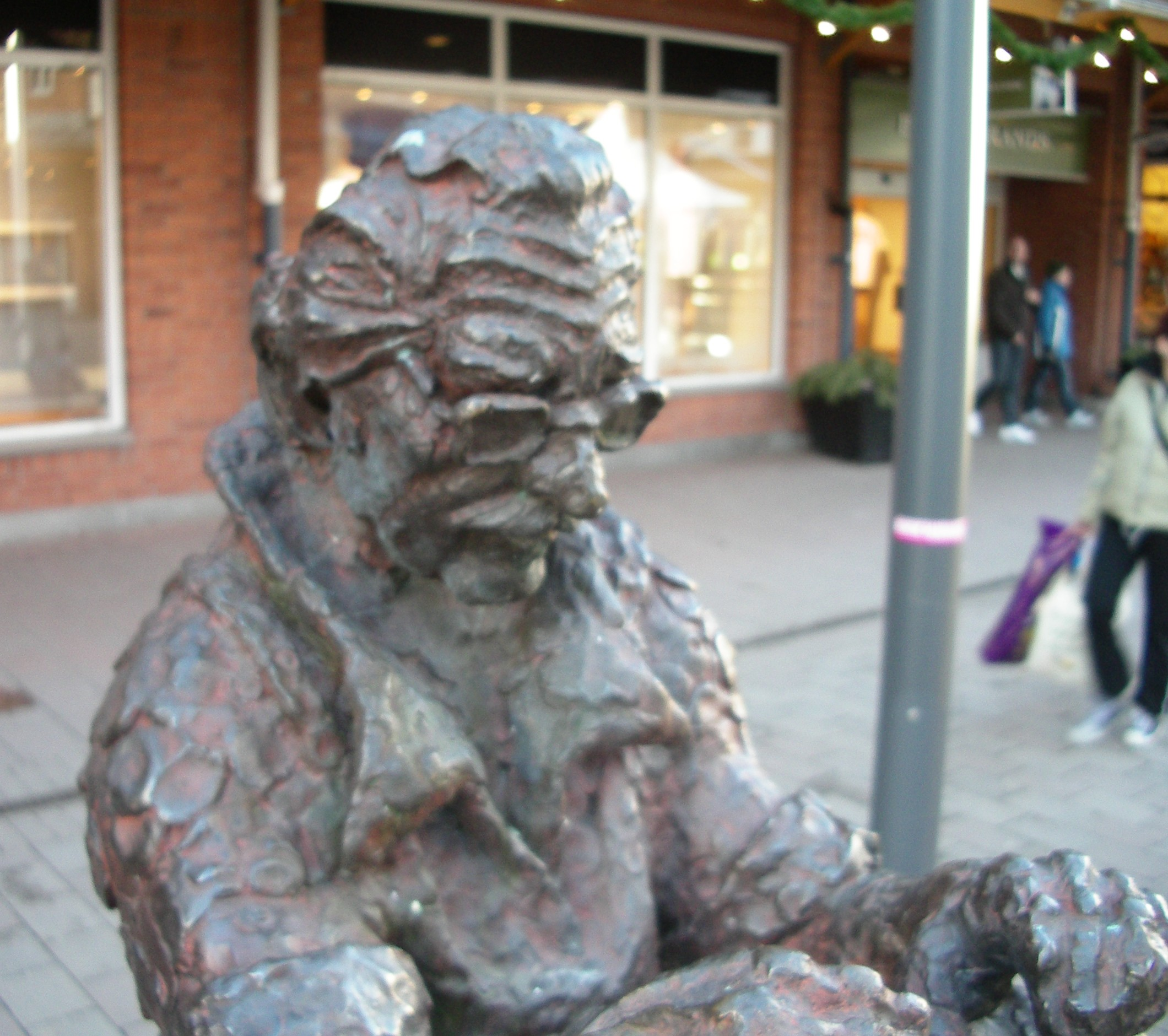 Portrait of artist Asmund Arle, by Jörgen Hammar, bronze, Huddinge Centre, Stockholm